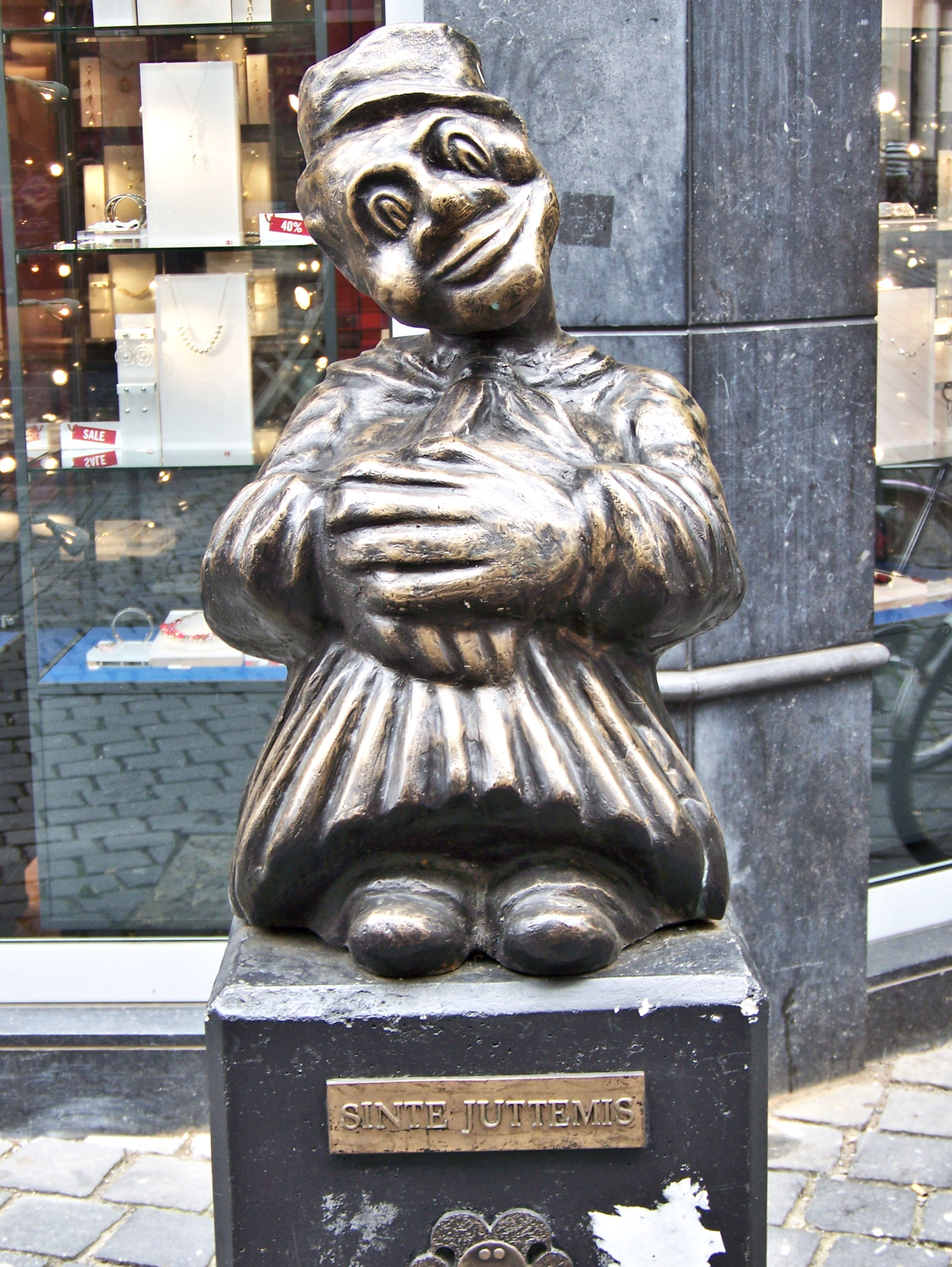 Sint Juttemis (1991) van Aimé Tollenaar in de Ridderstraat in Breda. Volgens opschrift: "AANGEBODEN DOOR STICHTING BREDASE CARNAVAL VIERING 5 x 11 jaar 17 - 11 - 1991"